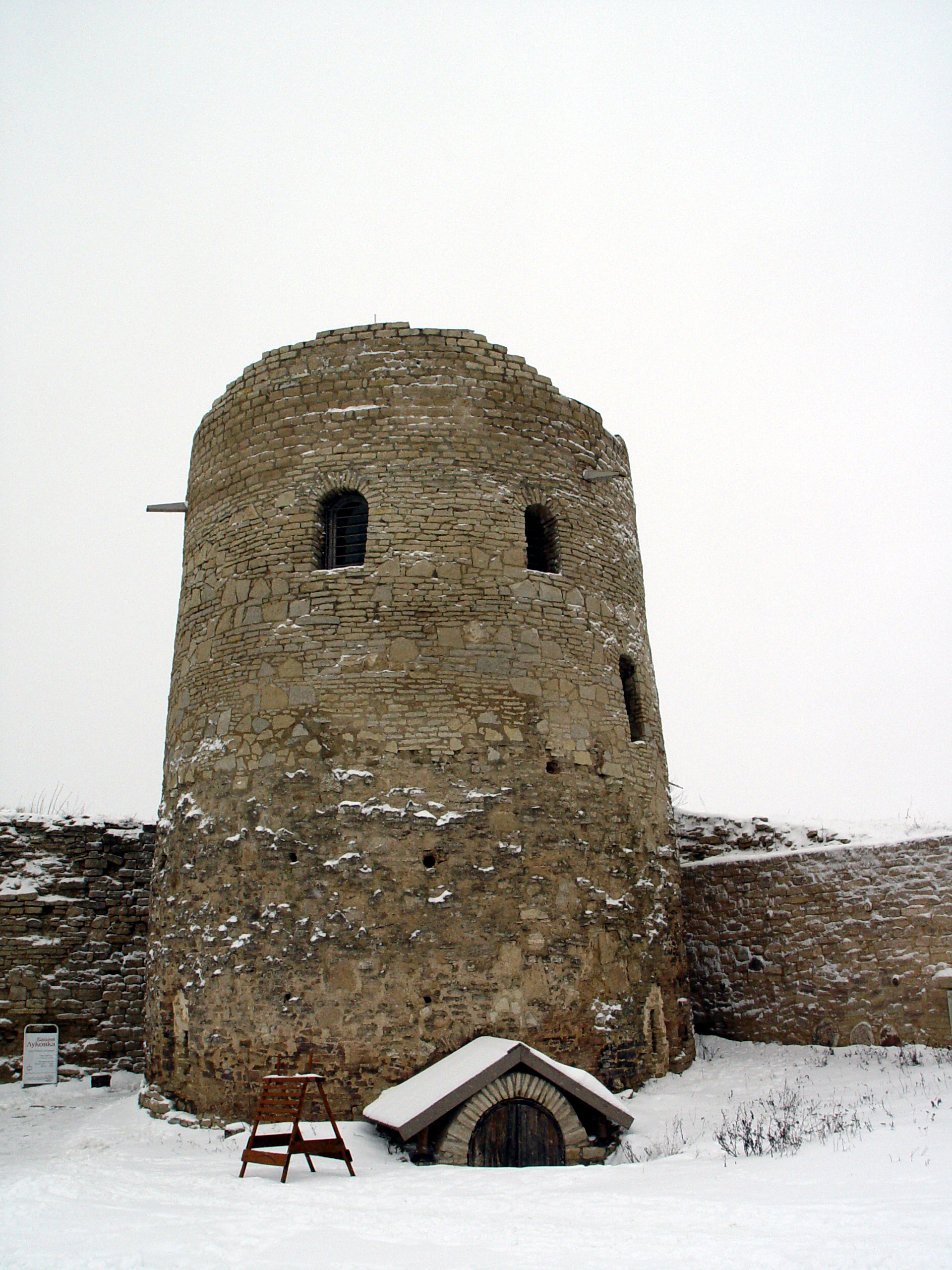 Tower 'Lukovka' in Izborsk fortress